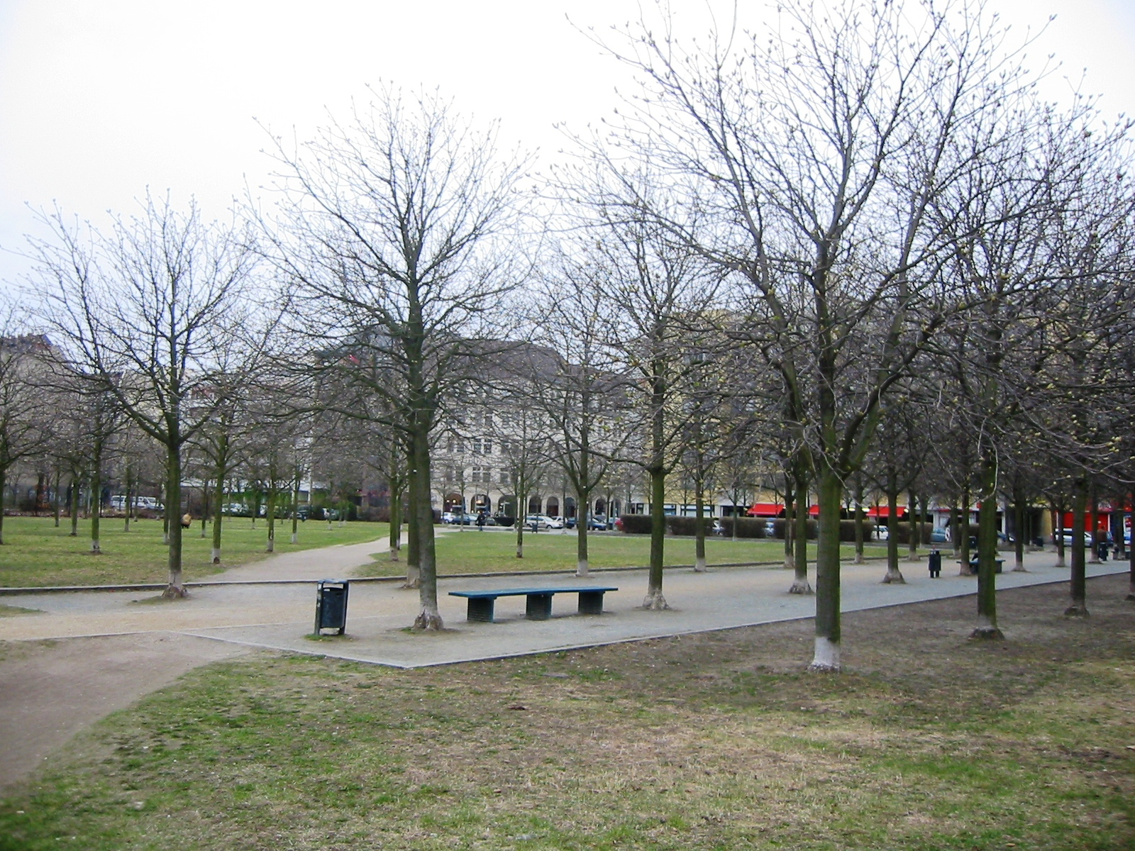 Besselpark in Berlin-Kreuzberg (Deutschland)